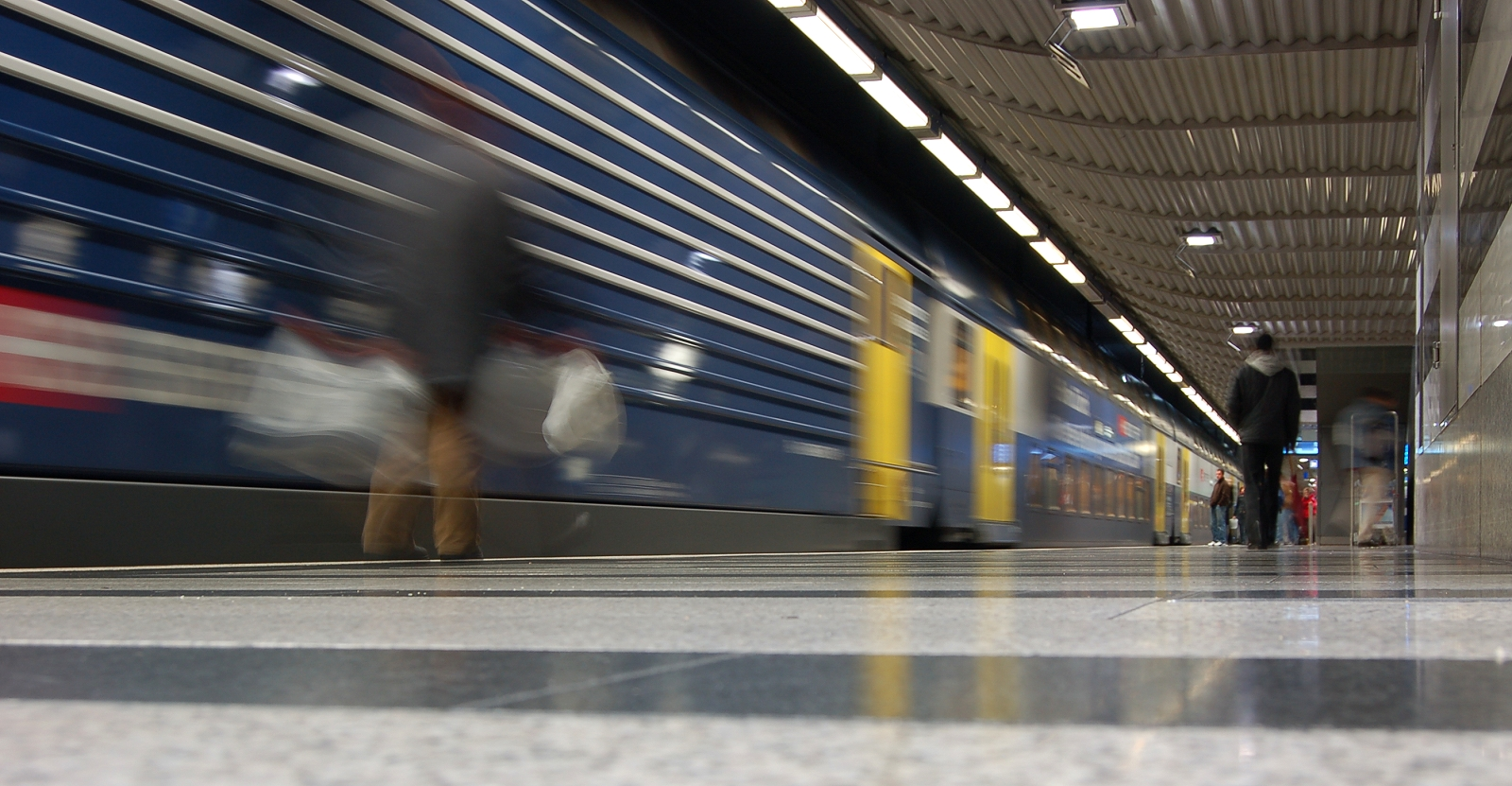 Re 450 einfahrend in den unterirdischen S-Bahnhof «Museumstrasse» beim Bahnhof Zürich